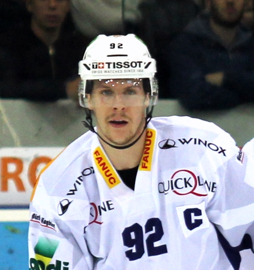 Gaëtan Haas (EHC Biel)